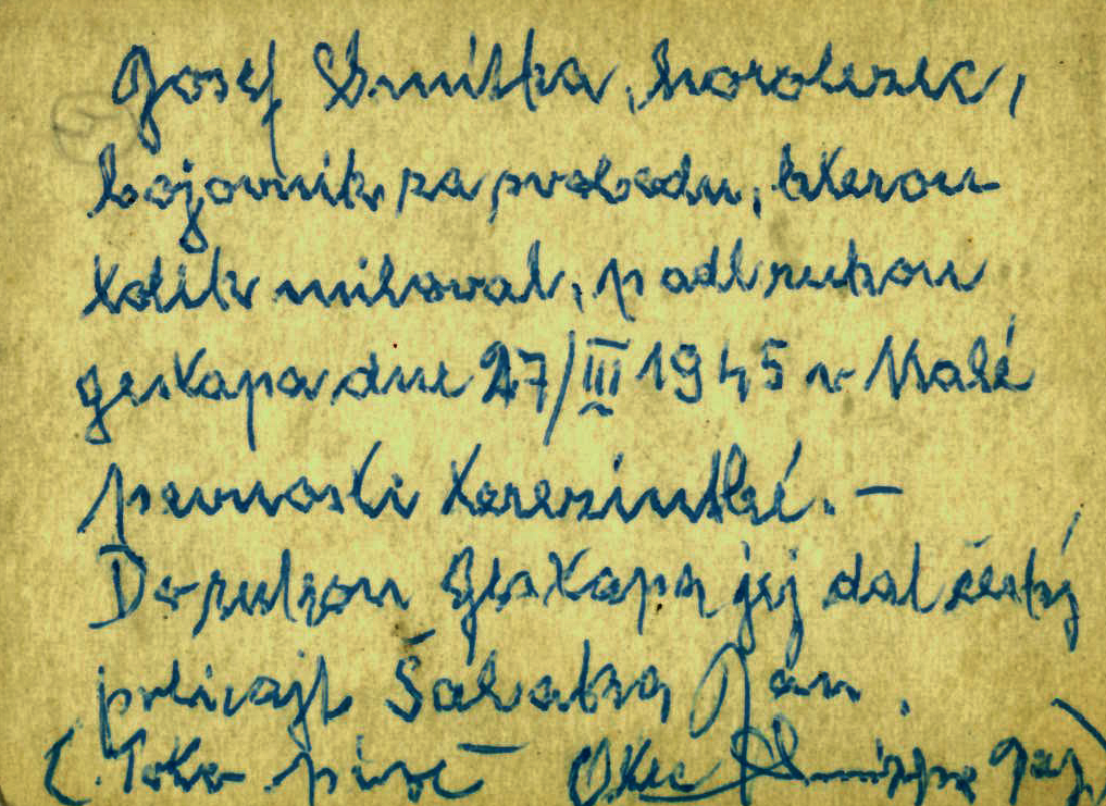 Ukázka rukopisu Josky Smítky